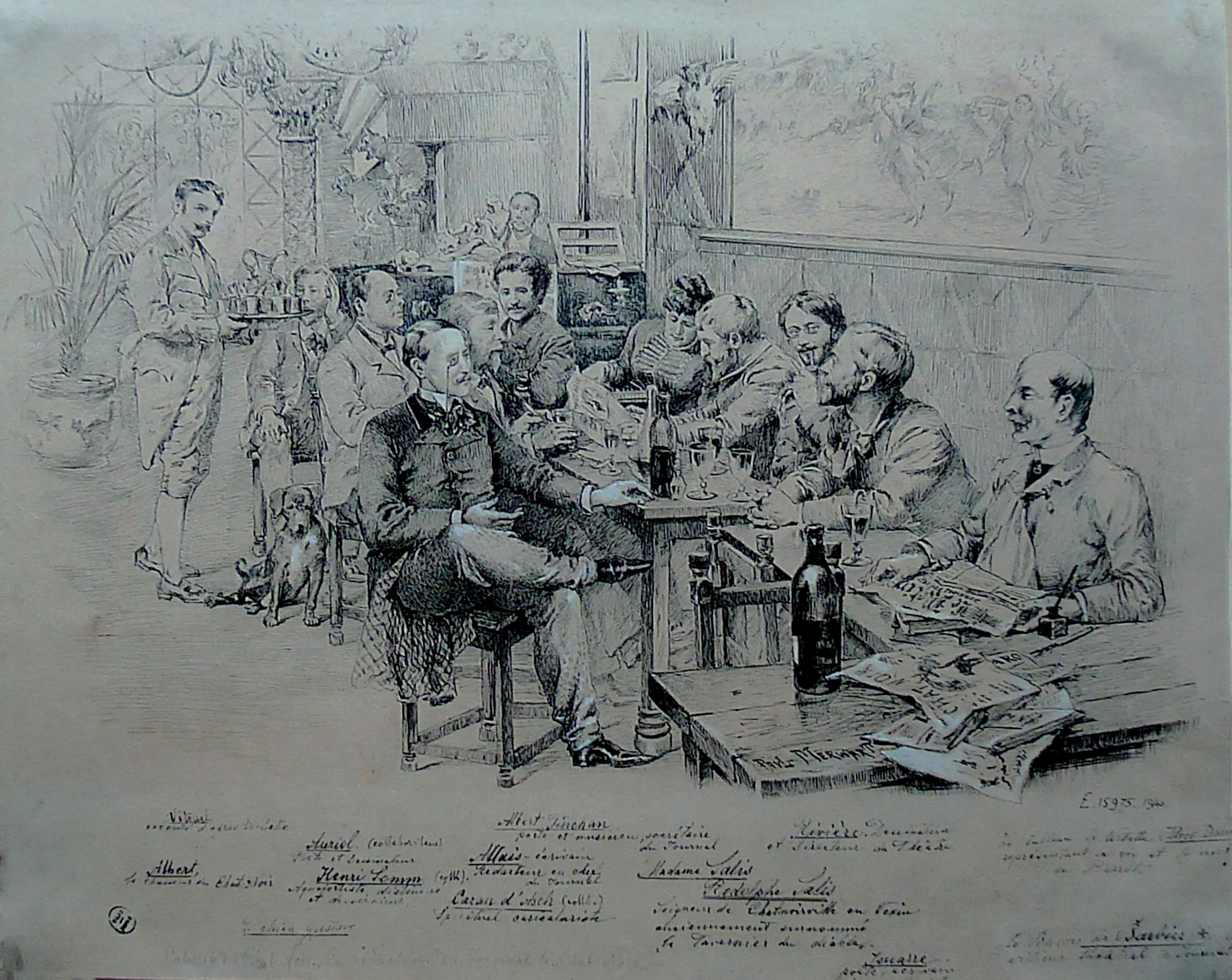 La rédaction du jourmal au Chat Noir (vers 1882) - Musée Carnavalet (Paris)